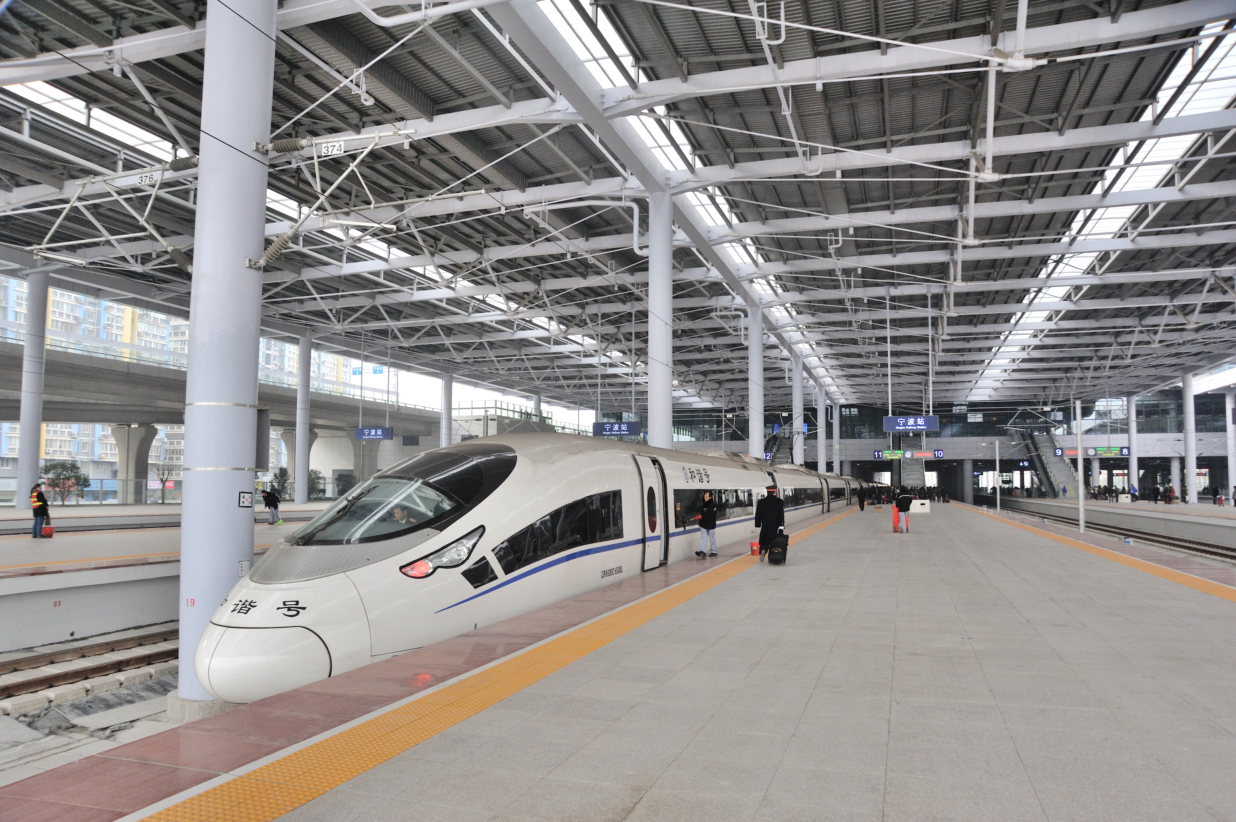 CRH380C-6306L车头，摄于宁波站